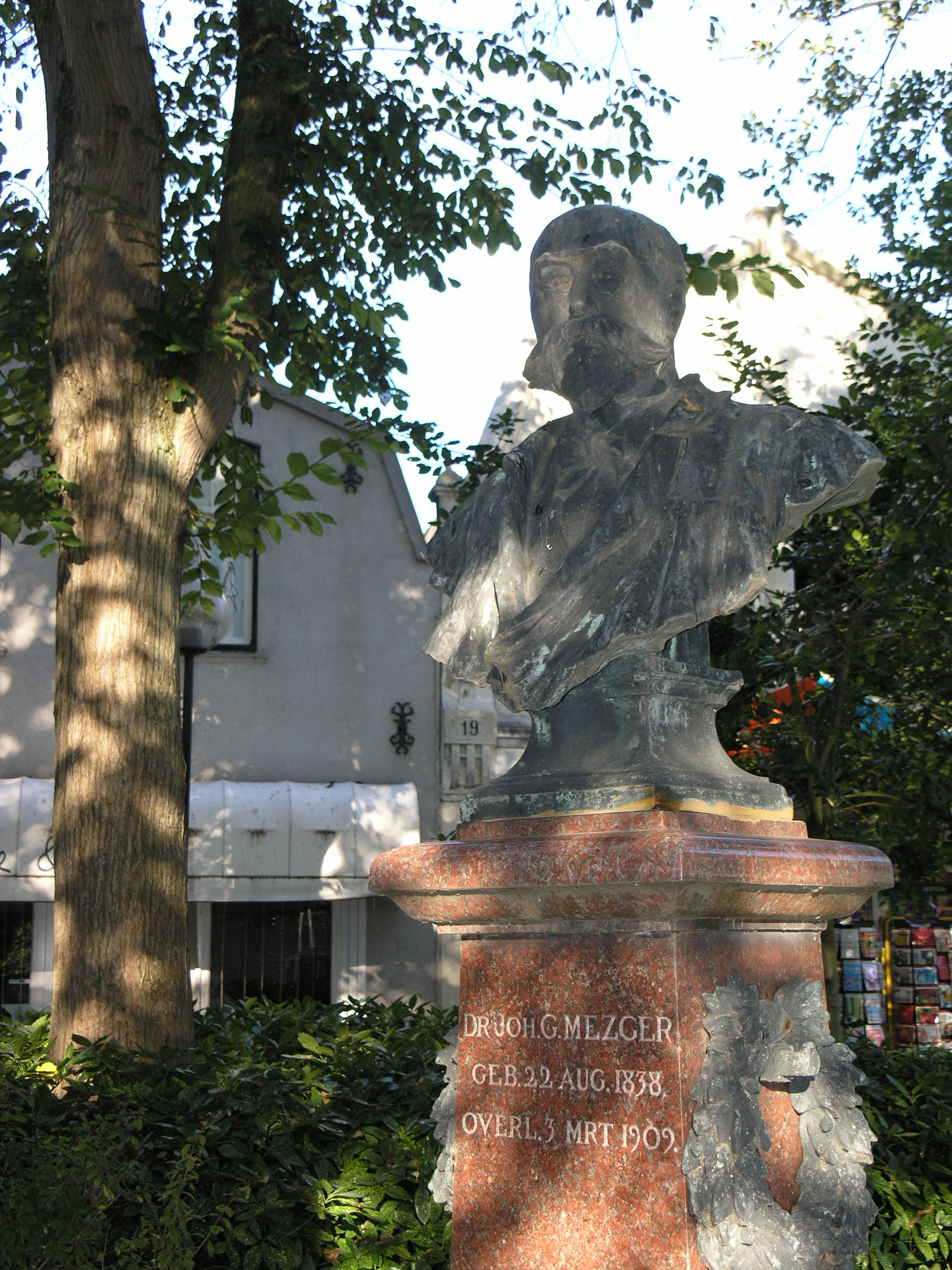 Domburg Statue of Dr J.G. Mezger